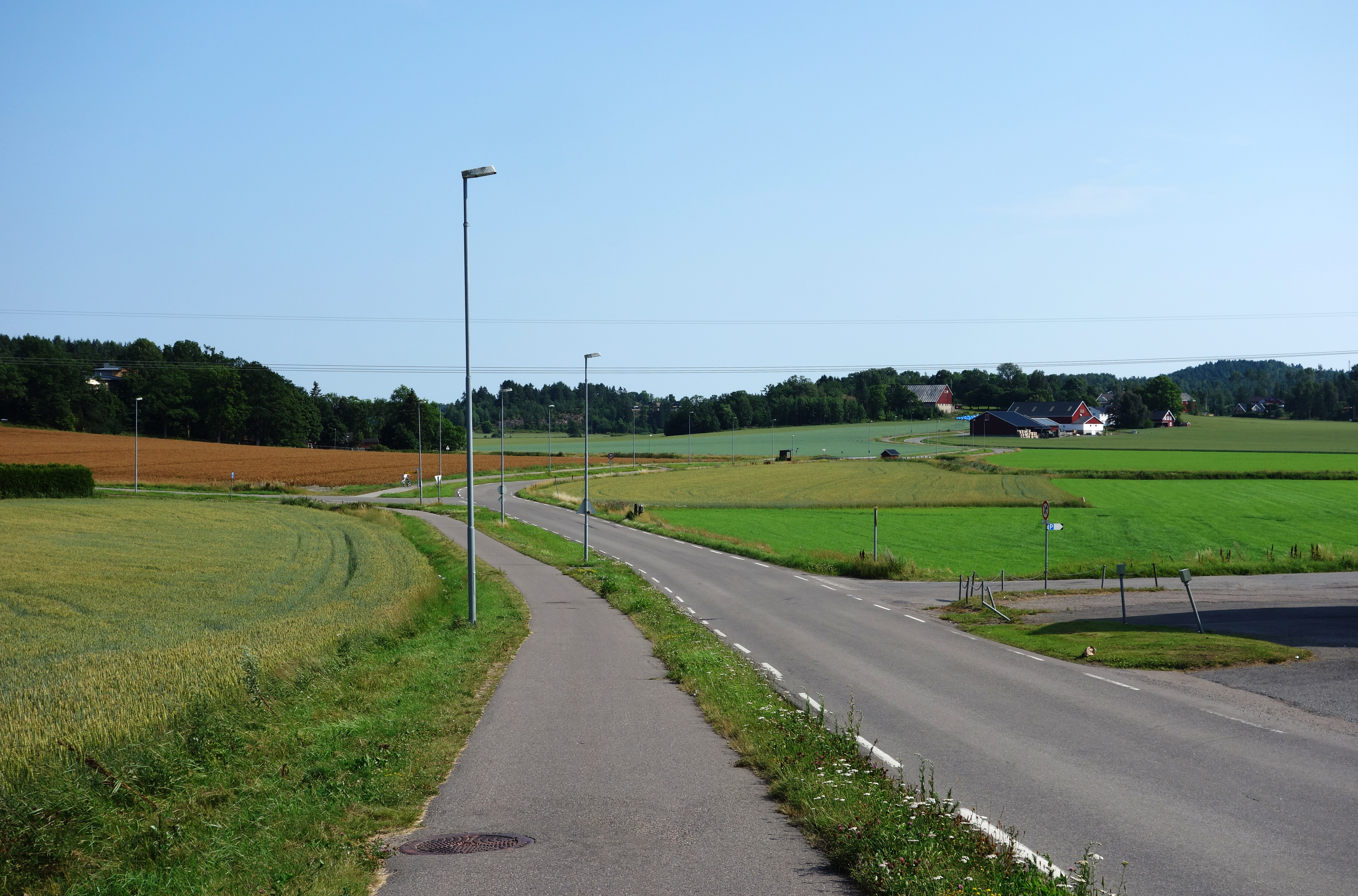 Semsjordene på Nøtterøy